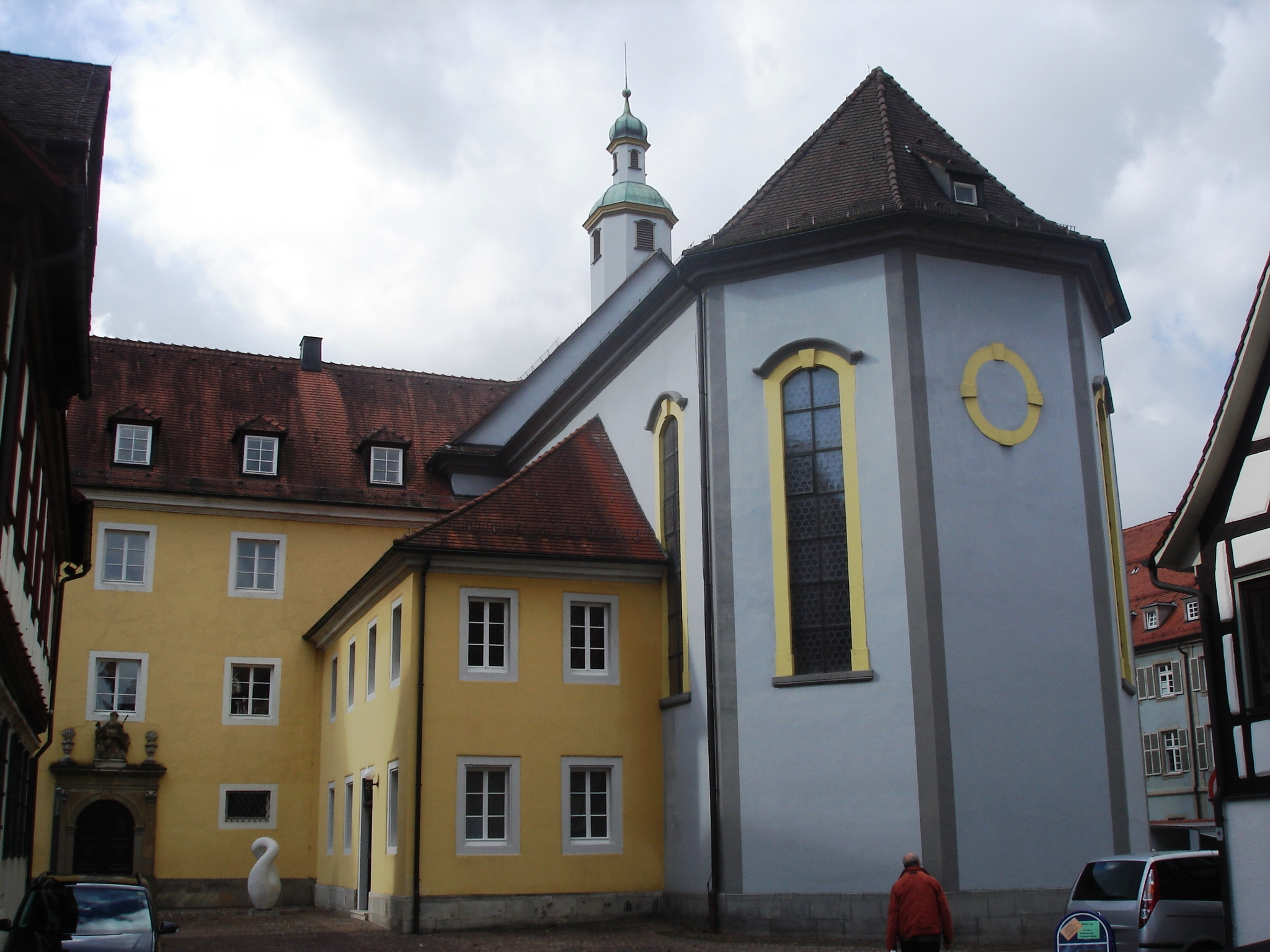 Ansicht St. Augustinus Schwäbisch Gmünd von Osten mit Chor und Klosterteile